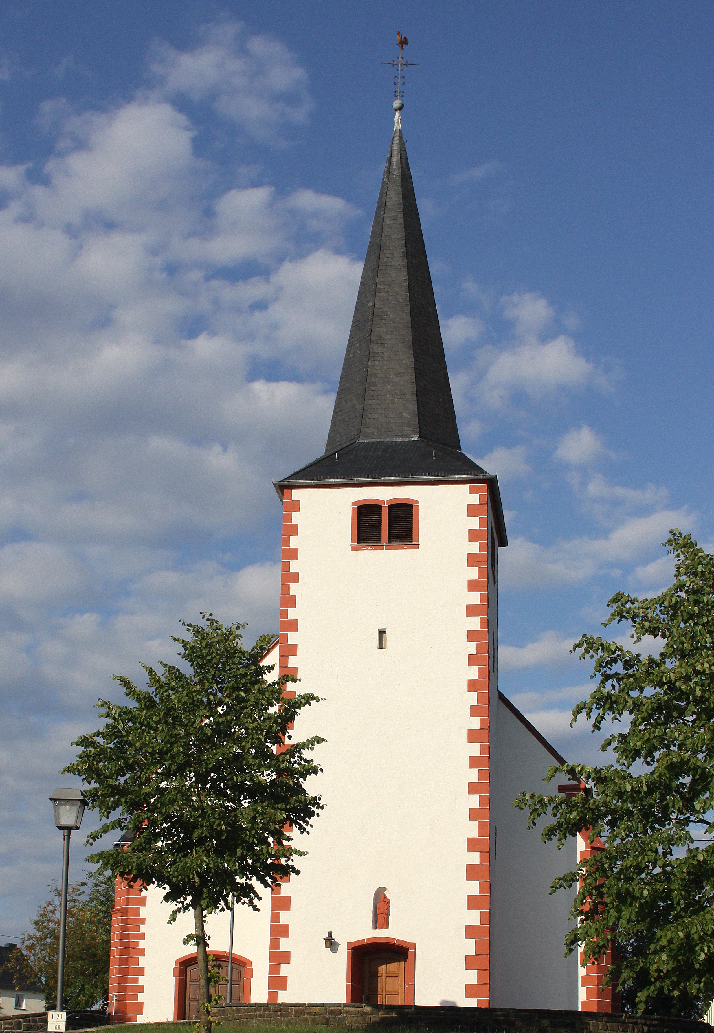 Sankt-Korneliuskierch zu Brandscheid